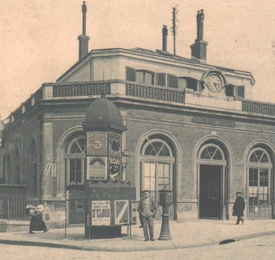 Gare du Parc Montsouris (14e) - Petite Ceinture